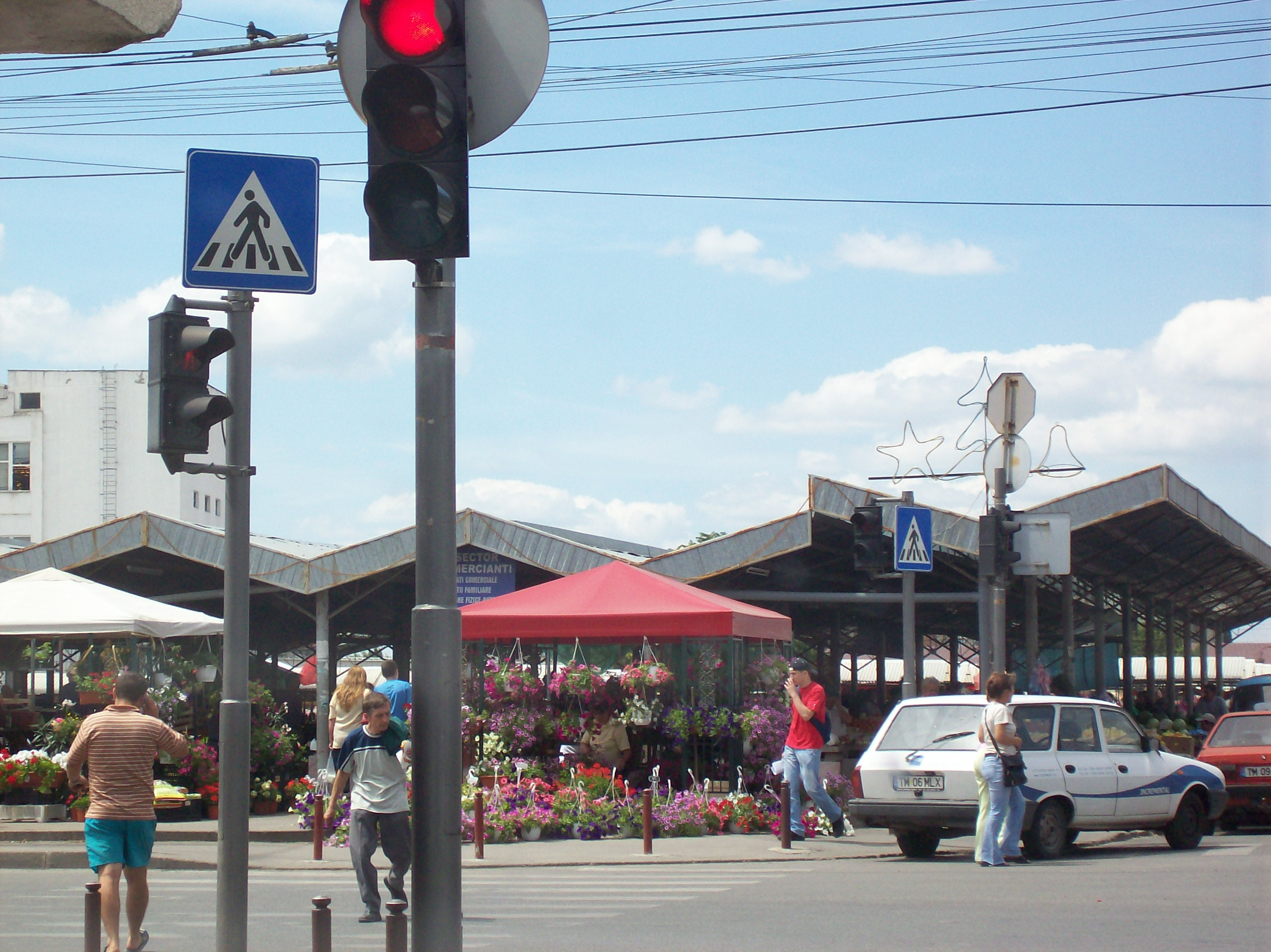 Markt, Timisoara 2006